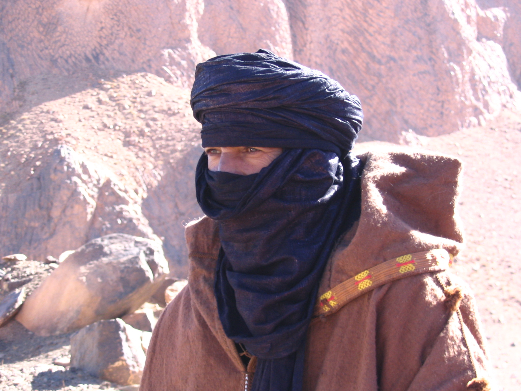 Targui, Algérie